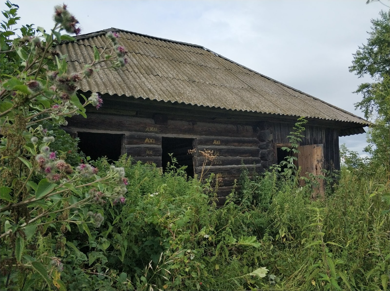 здание принадлежавшее клубу в д. Дружки